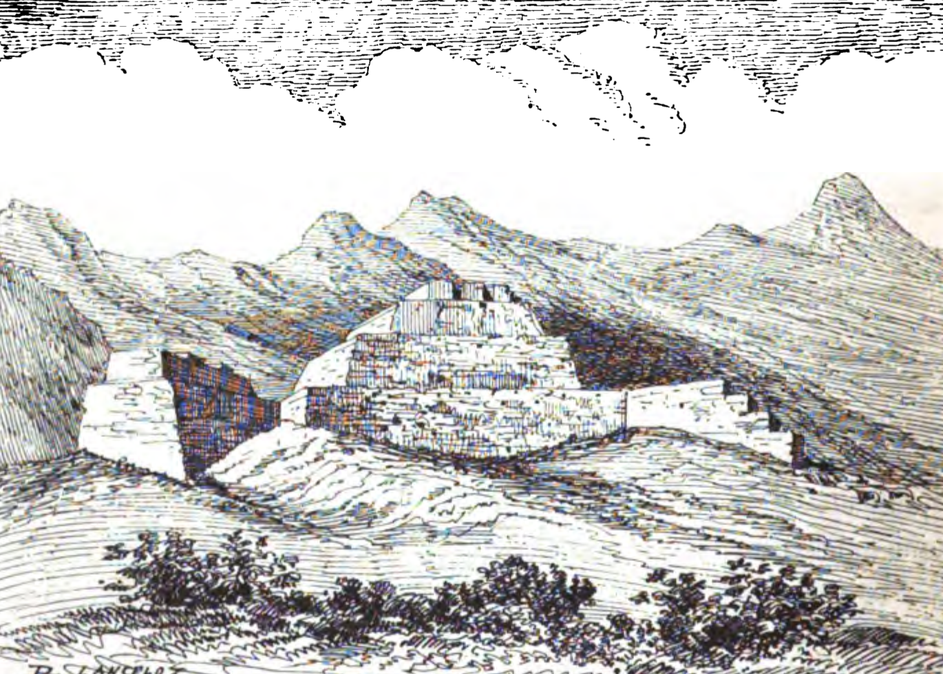 Vista de Fortaleza Paramonga